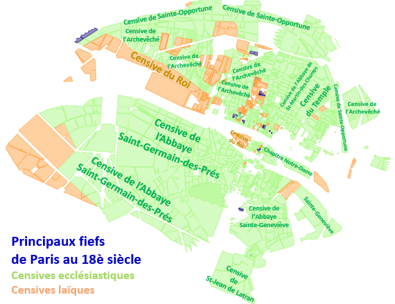 Fiefs de Paris au 18ème siècle